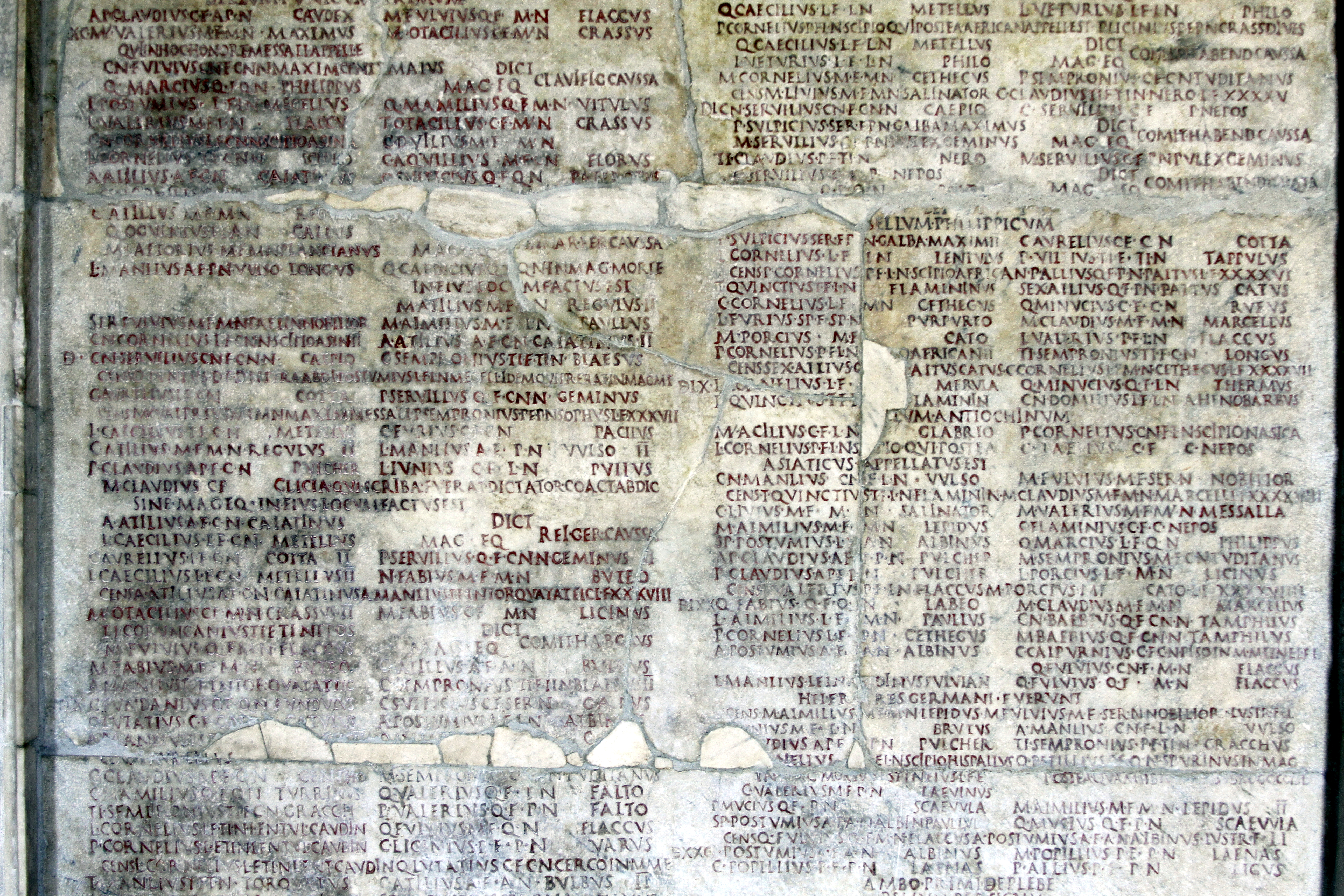 Palazzo dei Conservatori - Musei Capitolini - Rome